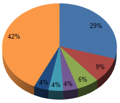 Religies in Nederland in 2008 Rooms-katholiek (29%) Hervormd (9%) PKN (6%) Gereformeerd (4%) Moslim (4%) Overige (4%) Geen gezindte (42%)